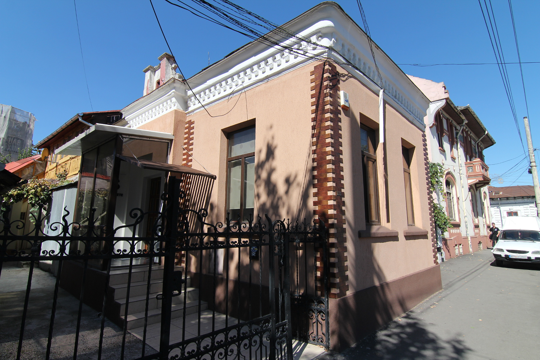 Casă pe strada Traian